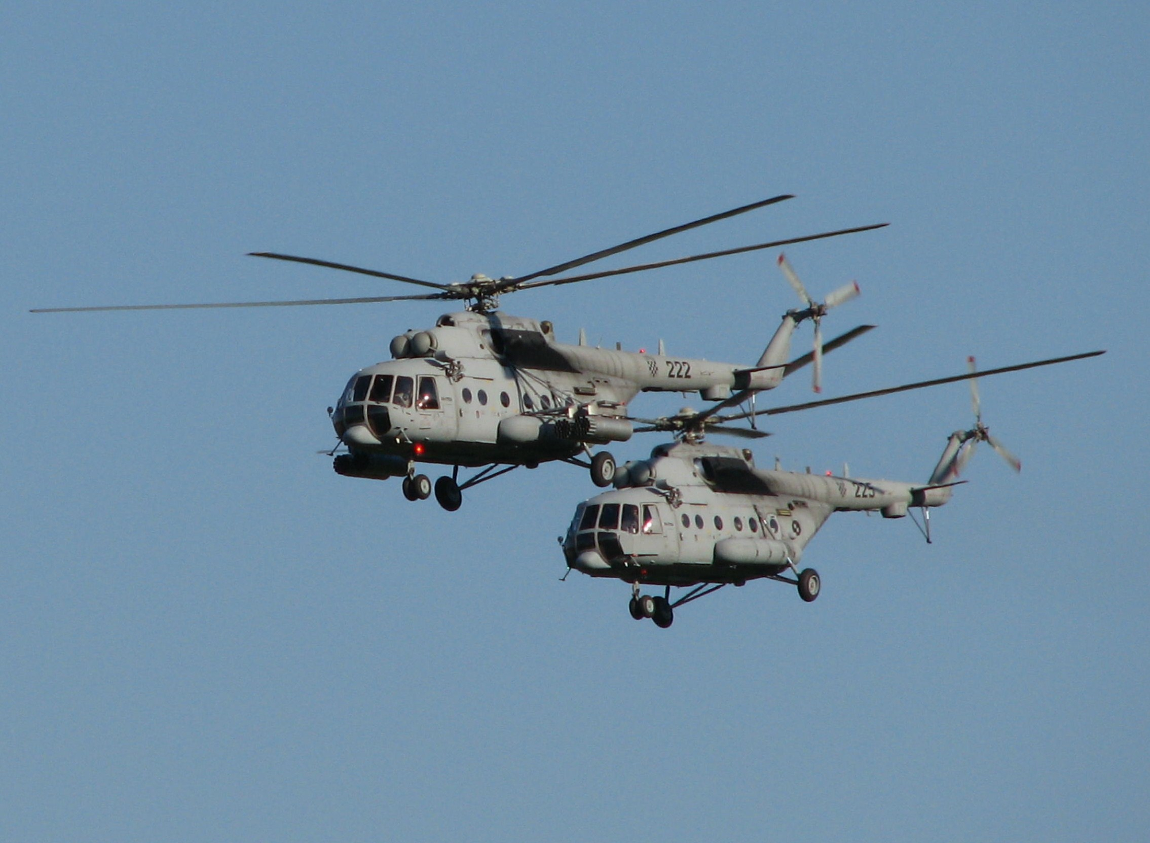 Mi-171 Sh Hrvatskog ratnog zrakoplovstva u Karlovcu, 2009.